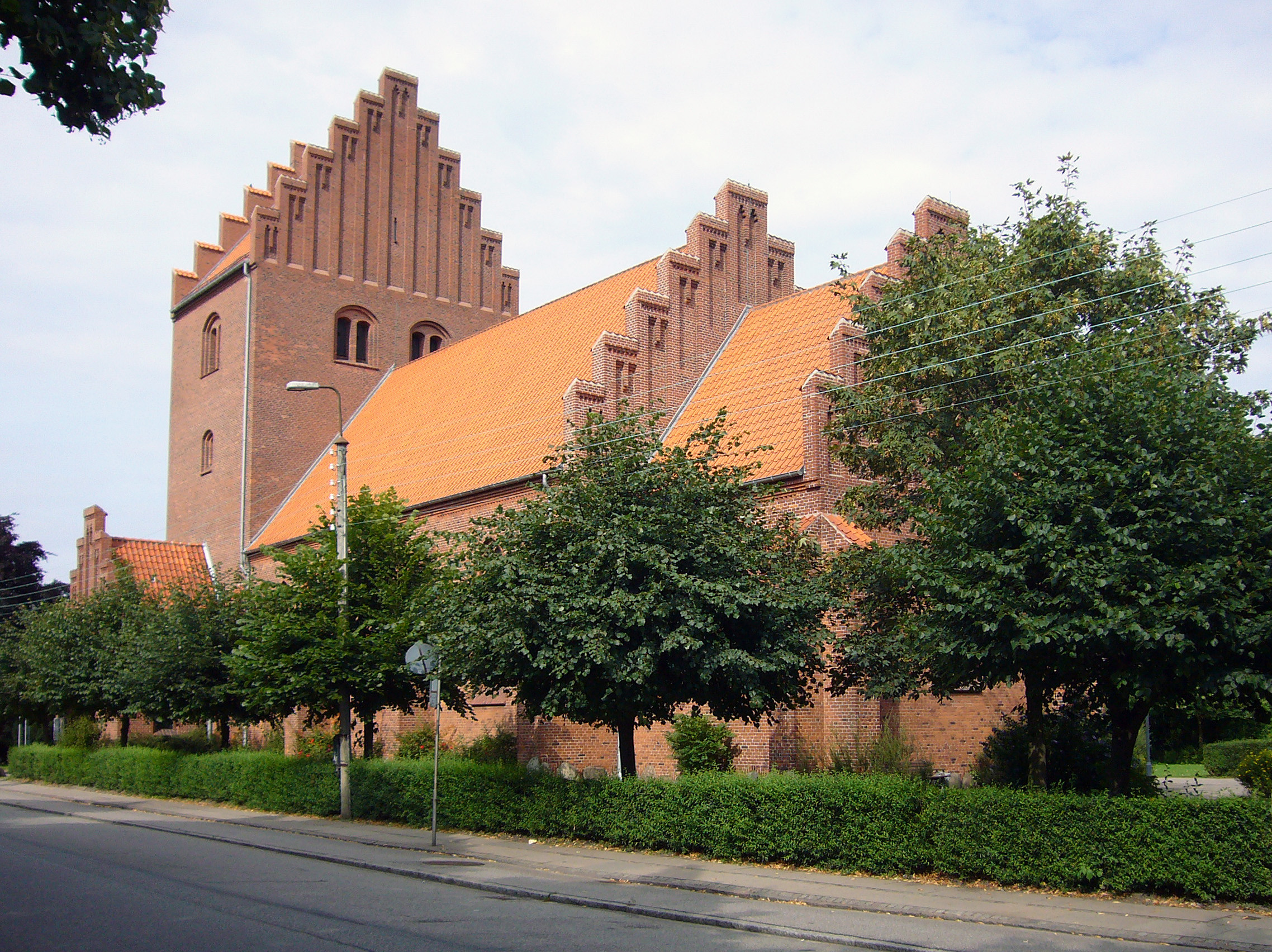 Højdevangskirken, Copenhagen, Denmark.